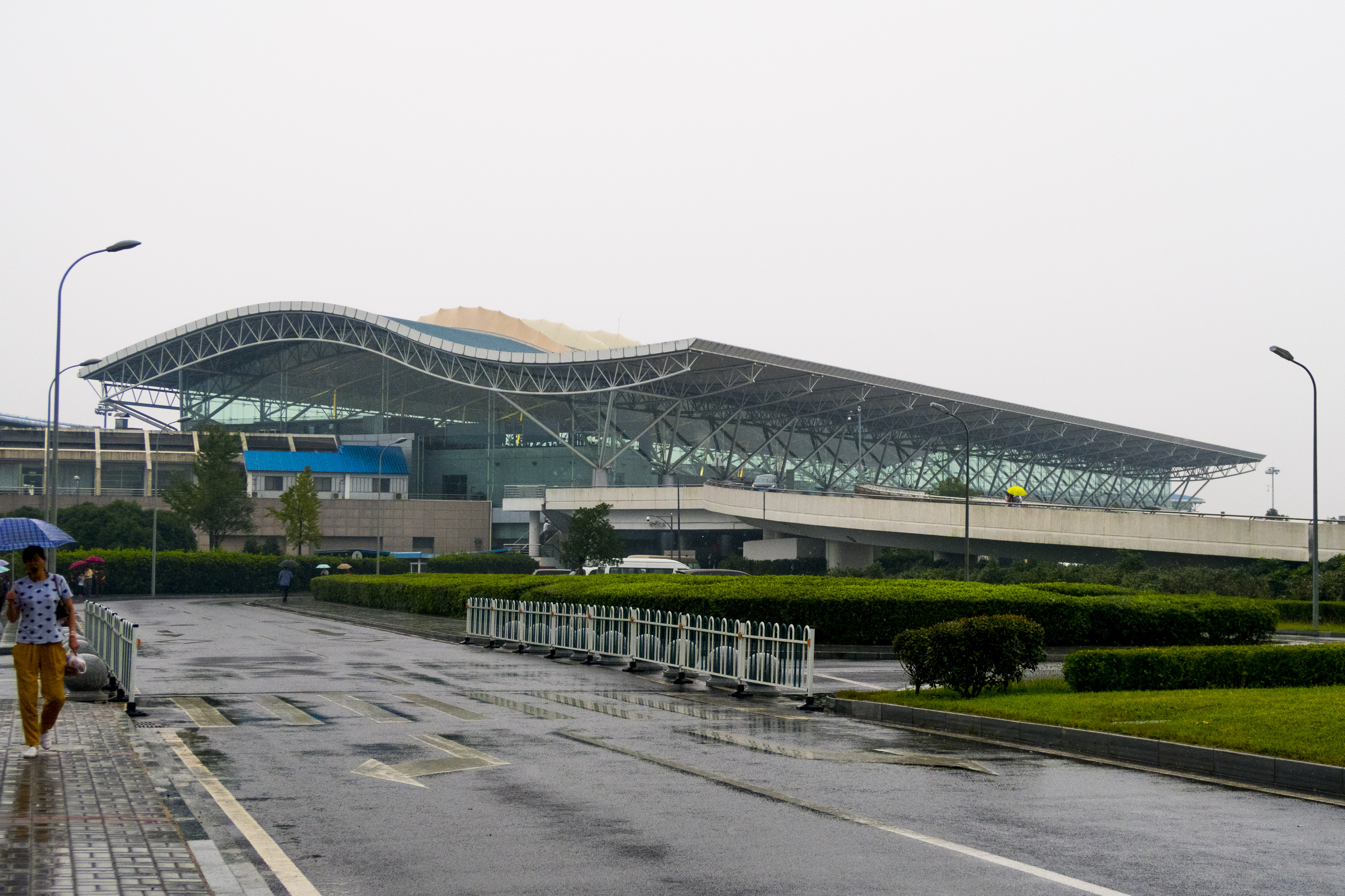 宁波栎社国际机场1号航站楼